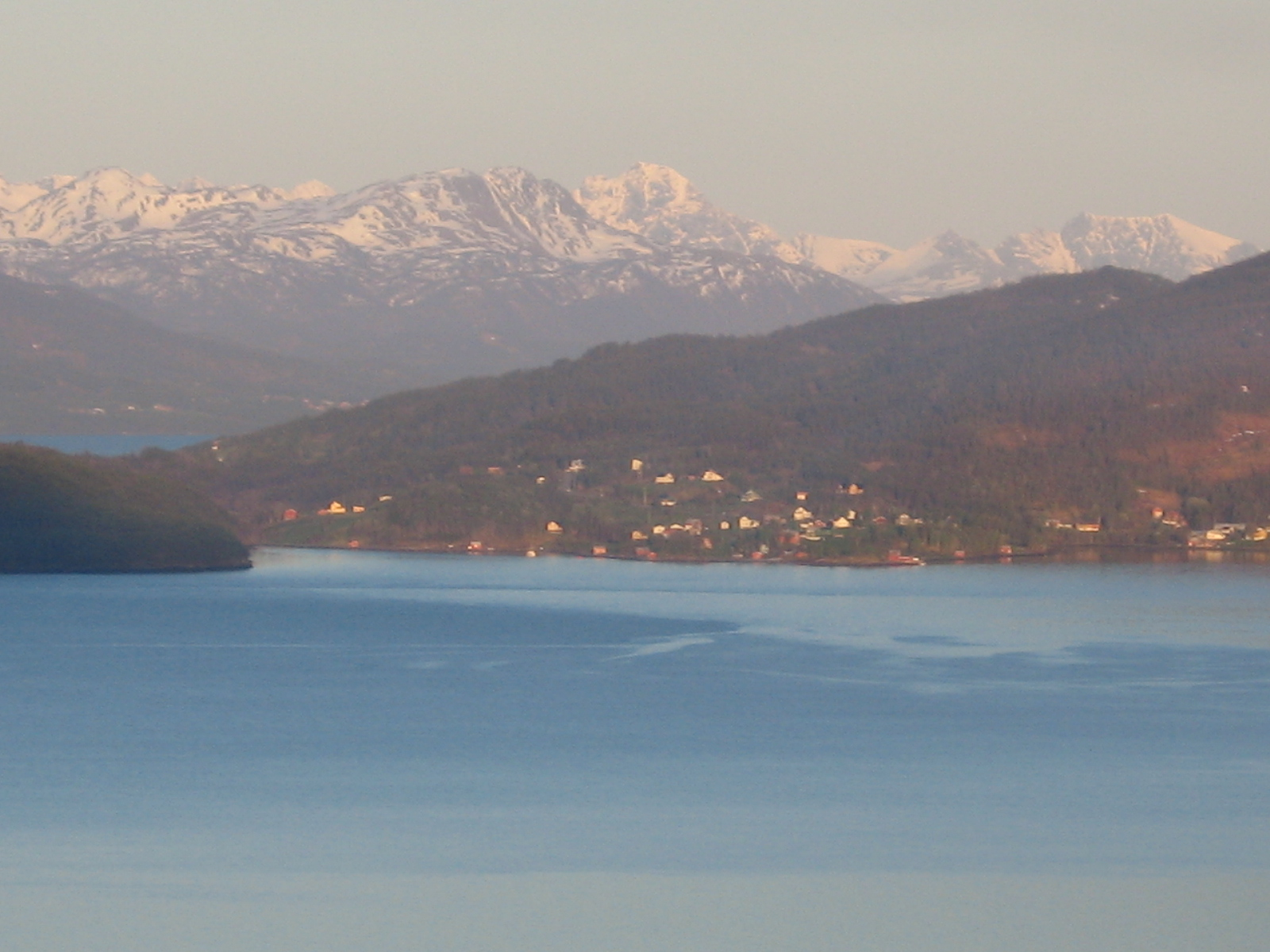 Vågan i Lenvik